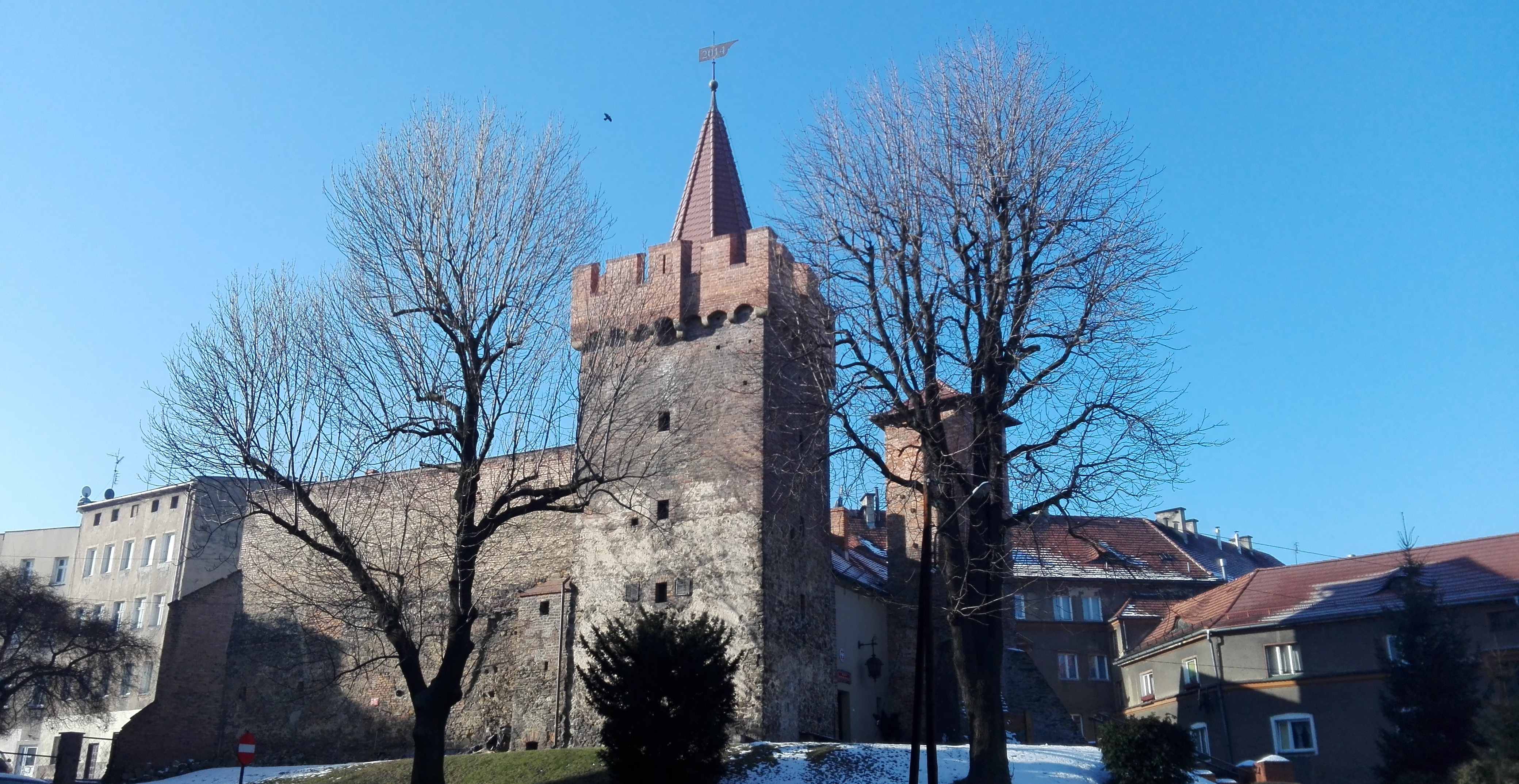 Prudnik, mury obronne (2 baszty po remoncie), XV–XVI, Muzeum Ziemi Prudnickiej 10.1958 and 867/64 from 12.05.1964.